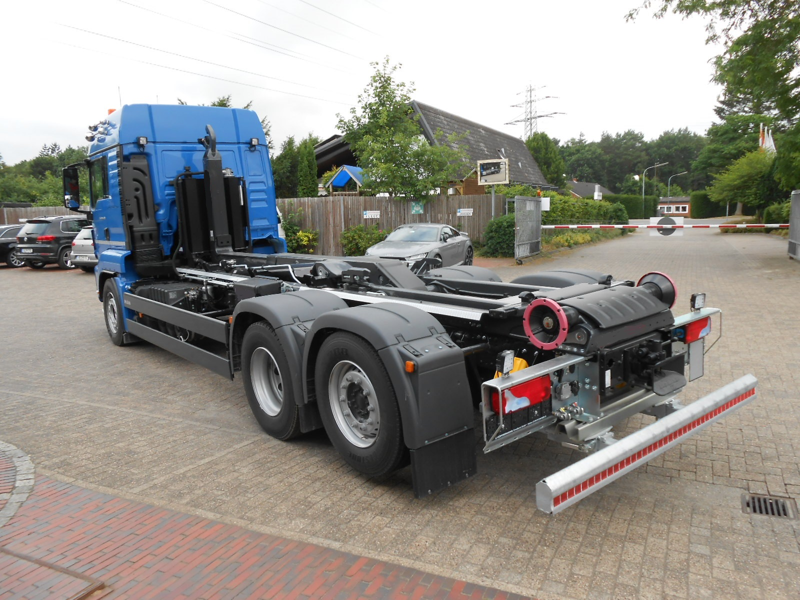 Abrollkipper